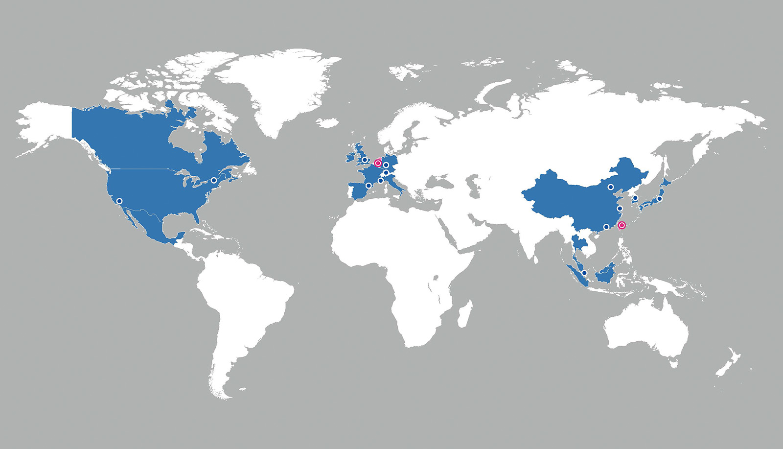 PI Worldwide, new Subsidiaries 2015